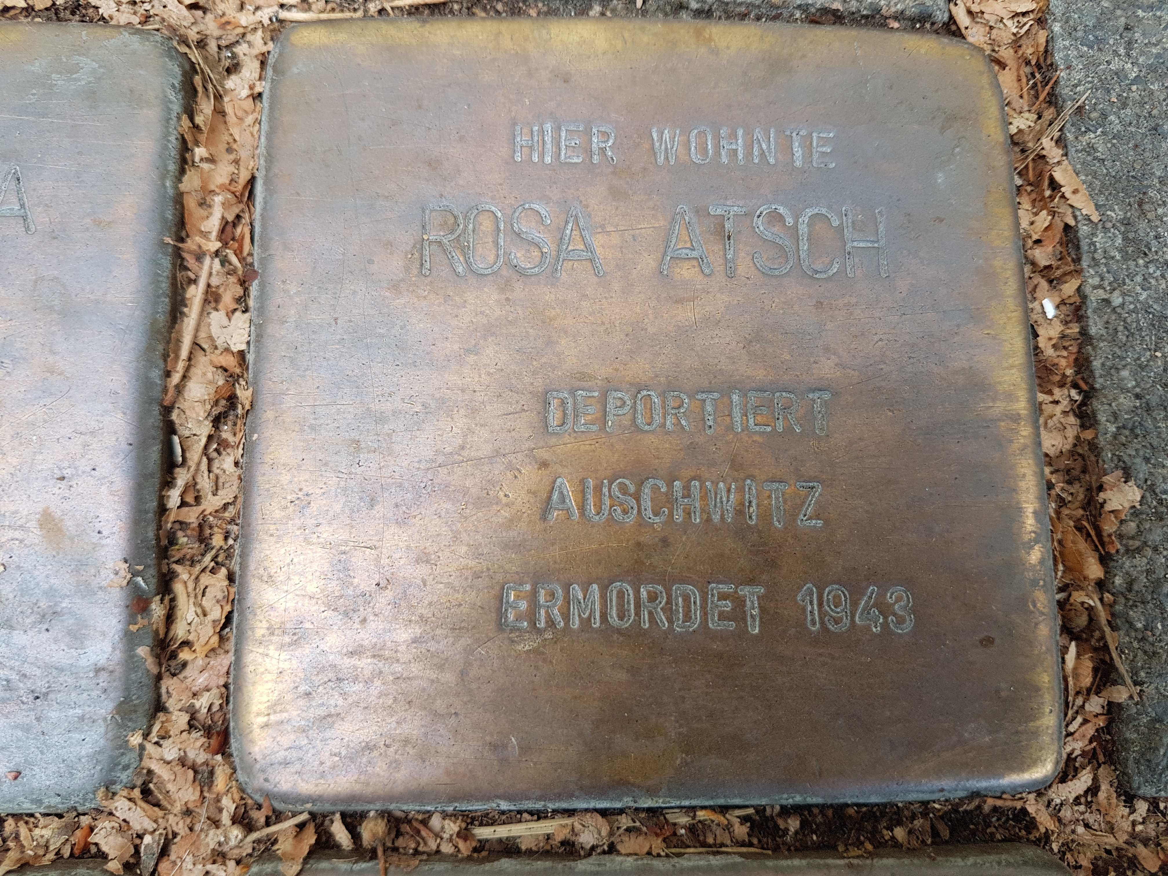 Stolperstein Duisburg Rosa Atsch